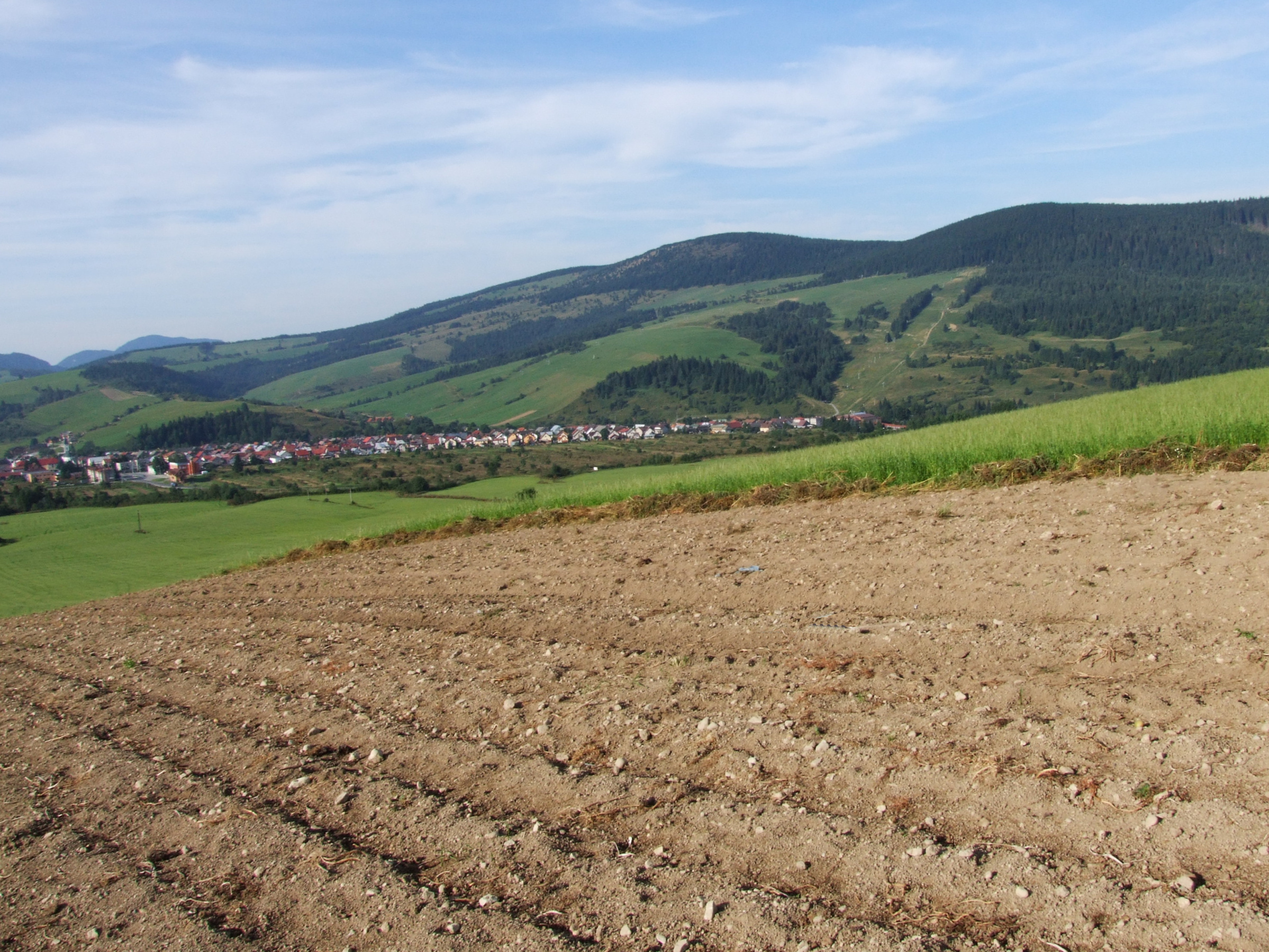 Habówka (Habovka). Ogólny widok części łączącej się z Zubercem